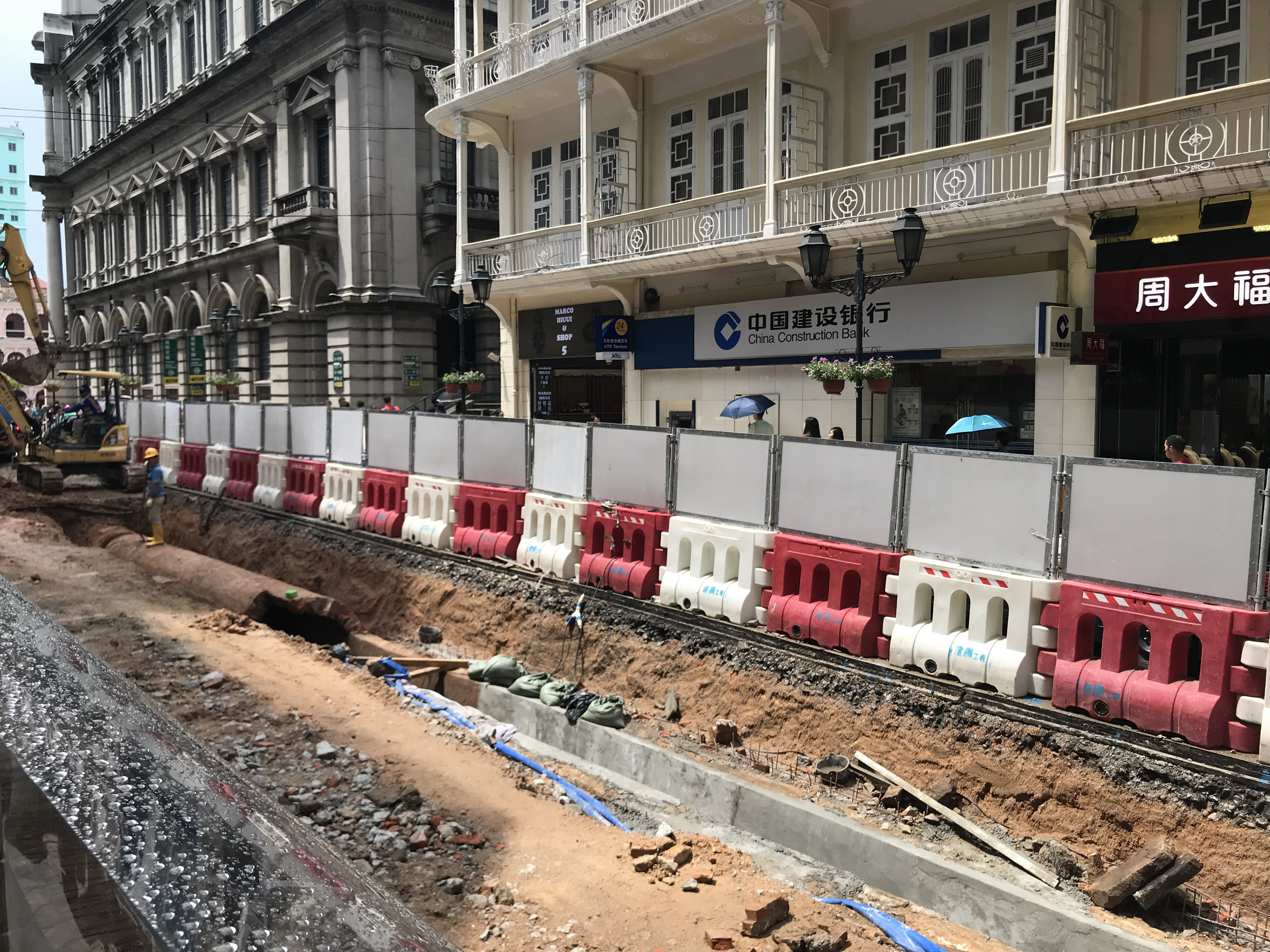 中文（台灣）: 新馬路地下的百年石板渠被維修/破壞。